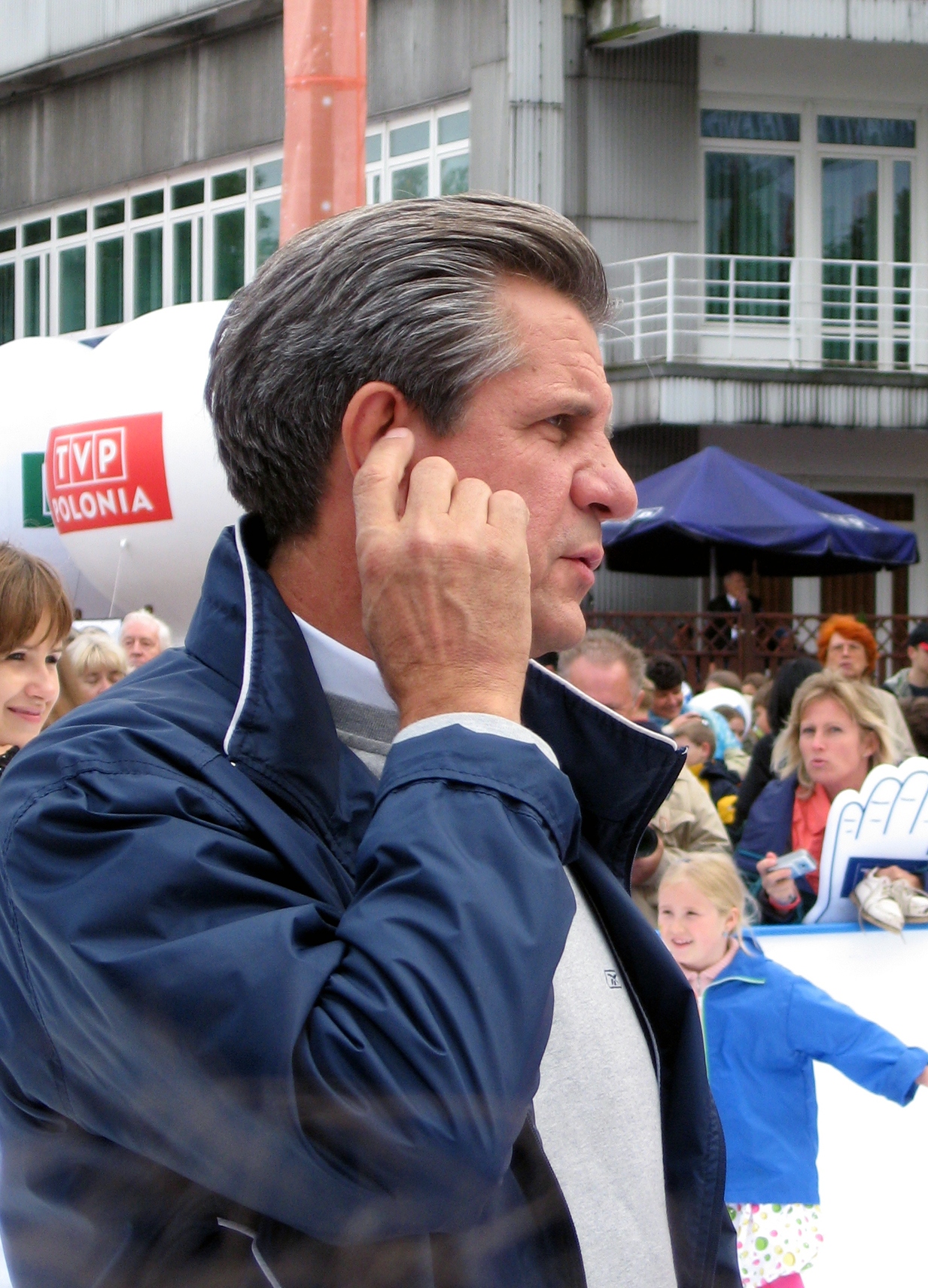 Zygmunt Chajzer na dniu Otwartym TVP (9 września 2007)